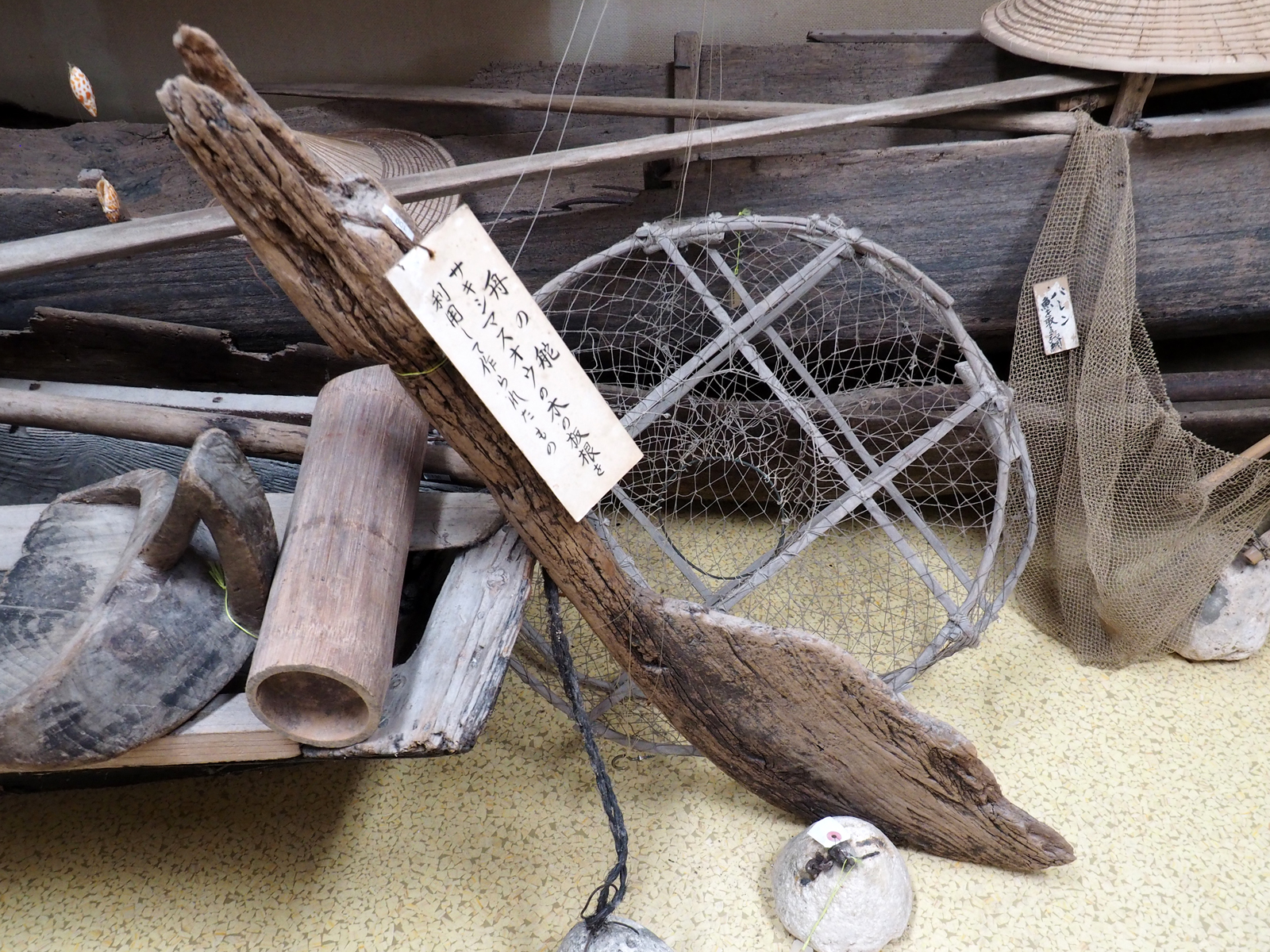 サキシマスオウノキ製の舵（沖縄県八重山郡竹富町竹富島喜宝院蒐集館）